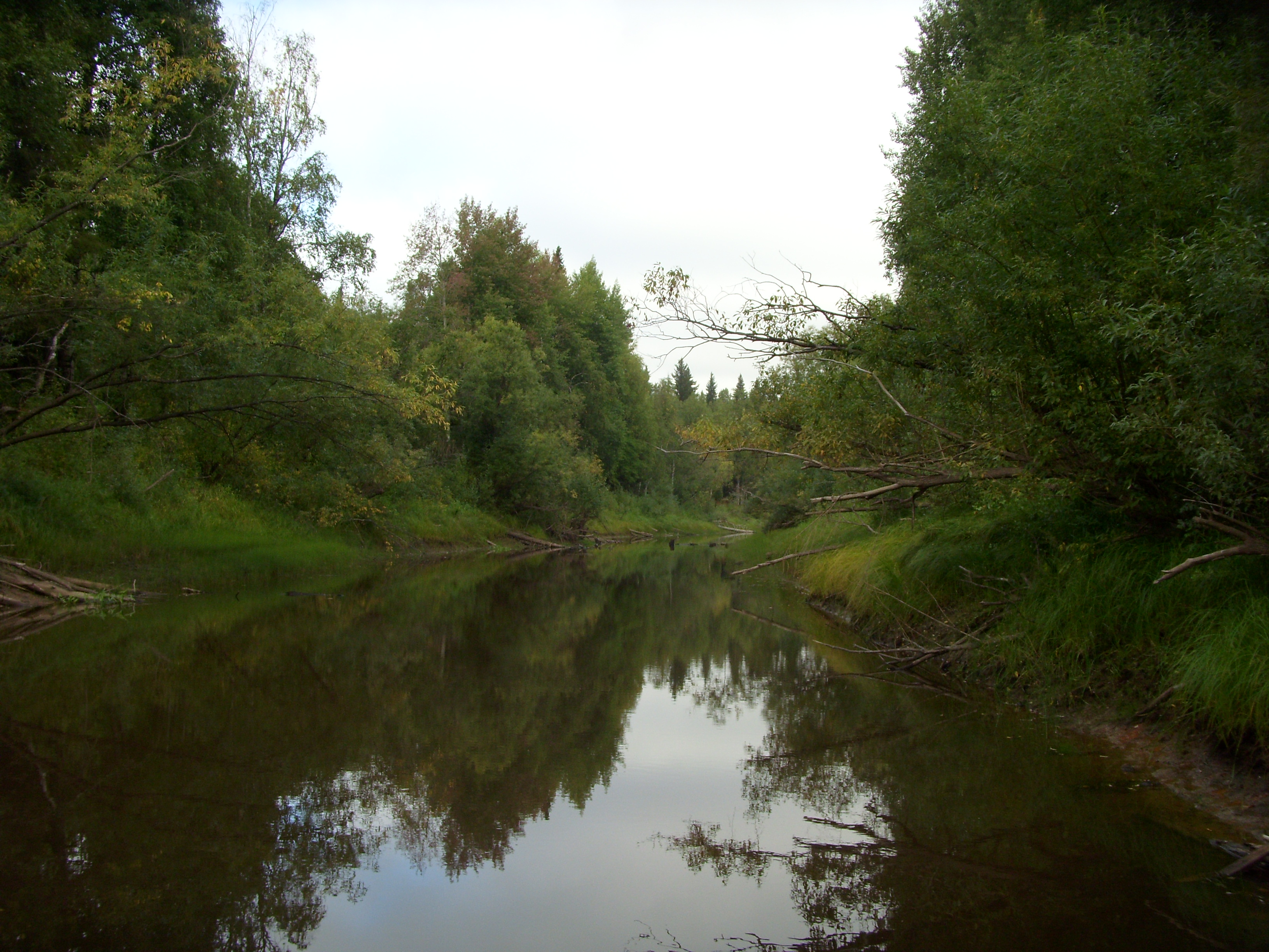 Река Большая Чача у автомоста дороги М8. Вид вниз по течению.